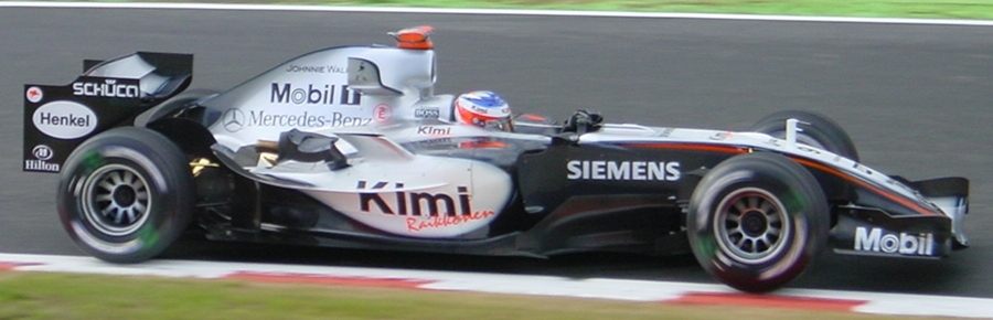 Kimi Räikkönen, McLaren MP4-20 (No-tabaco version)